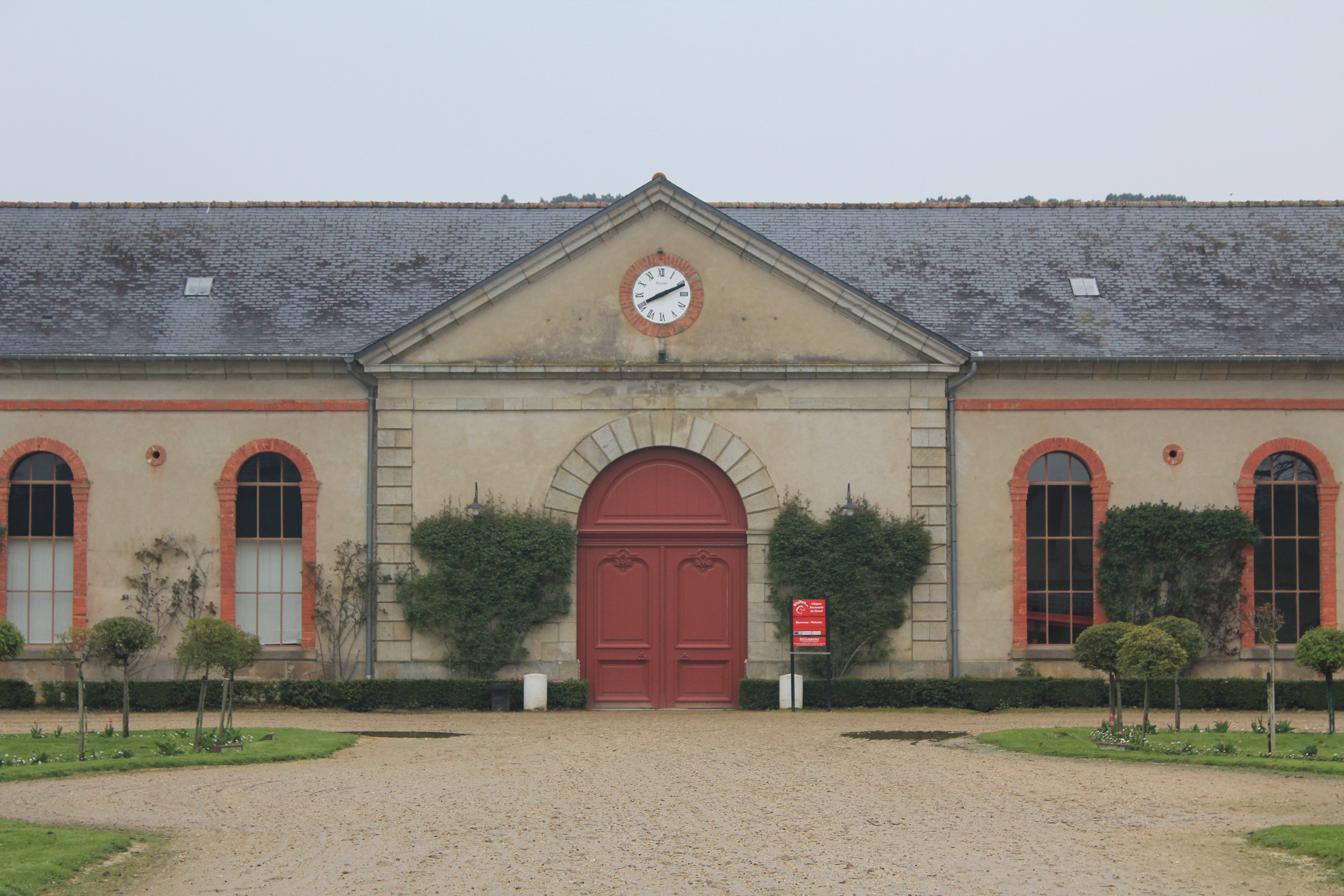 Entrée du Hars national d'Hennebont